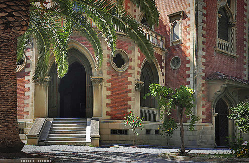 Villa Zerbi, un'antica villa in stile Veneziano sul Lungomare di Reggio Calabria Foto concessa dall'Autore - Saverio Autellitano, - purché se ne citi e se ne riconosca la paternità anche su opere derivate.